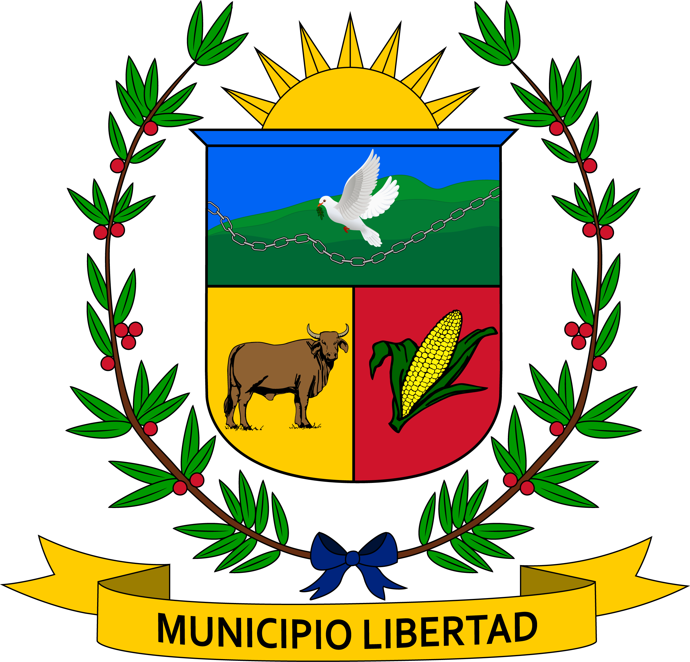 Escudo de Armas del Municipio Libertad (Anzoátegui)